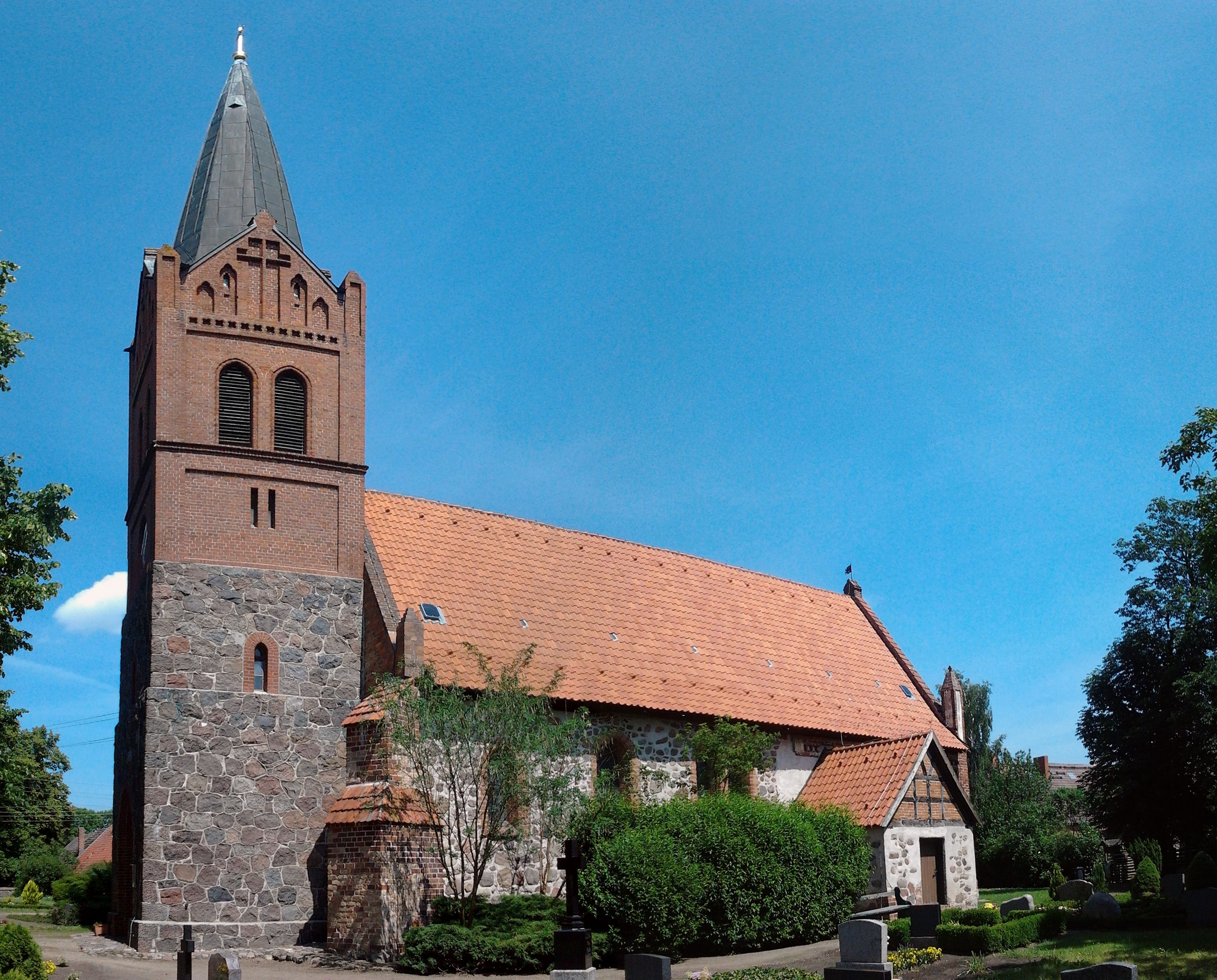 Kirche in Liepen, Landkreis Ostvorpommern, Nordseite